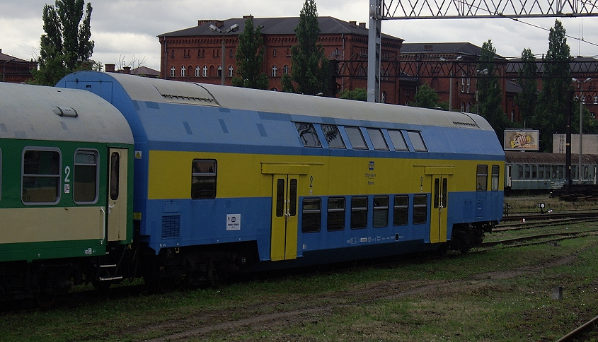 Wagon Bdhpumn na stacji Bydgoszcz Główna